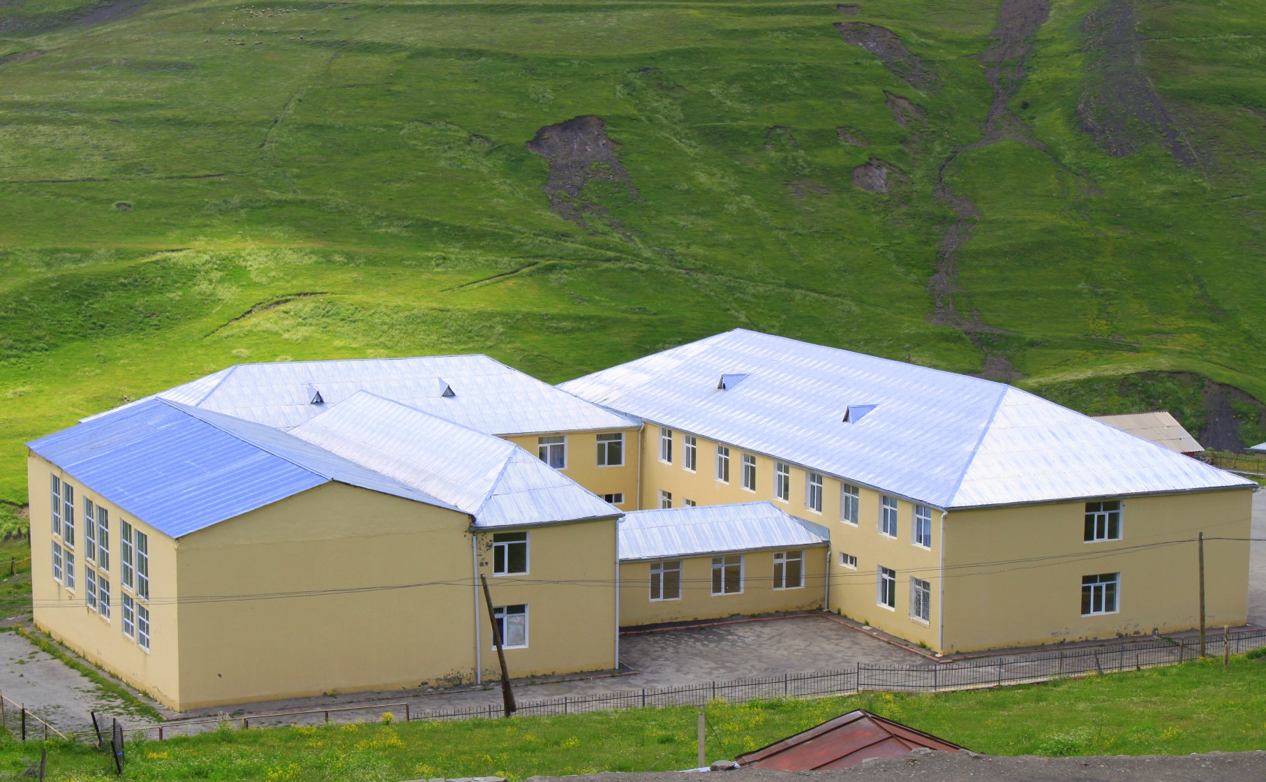 Xınalıq kənd orta məktəbi